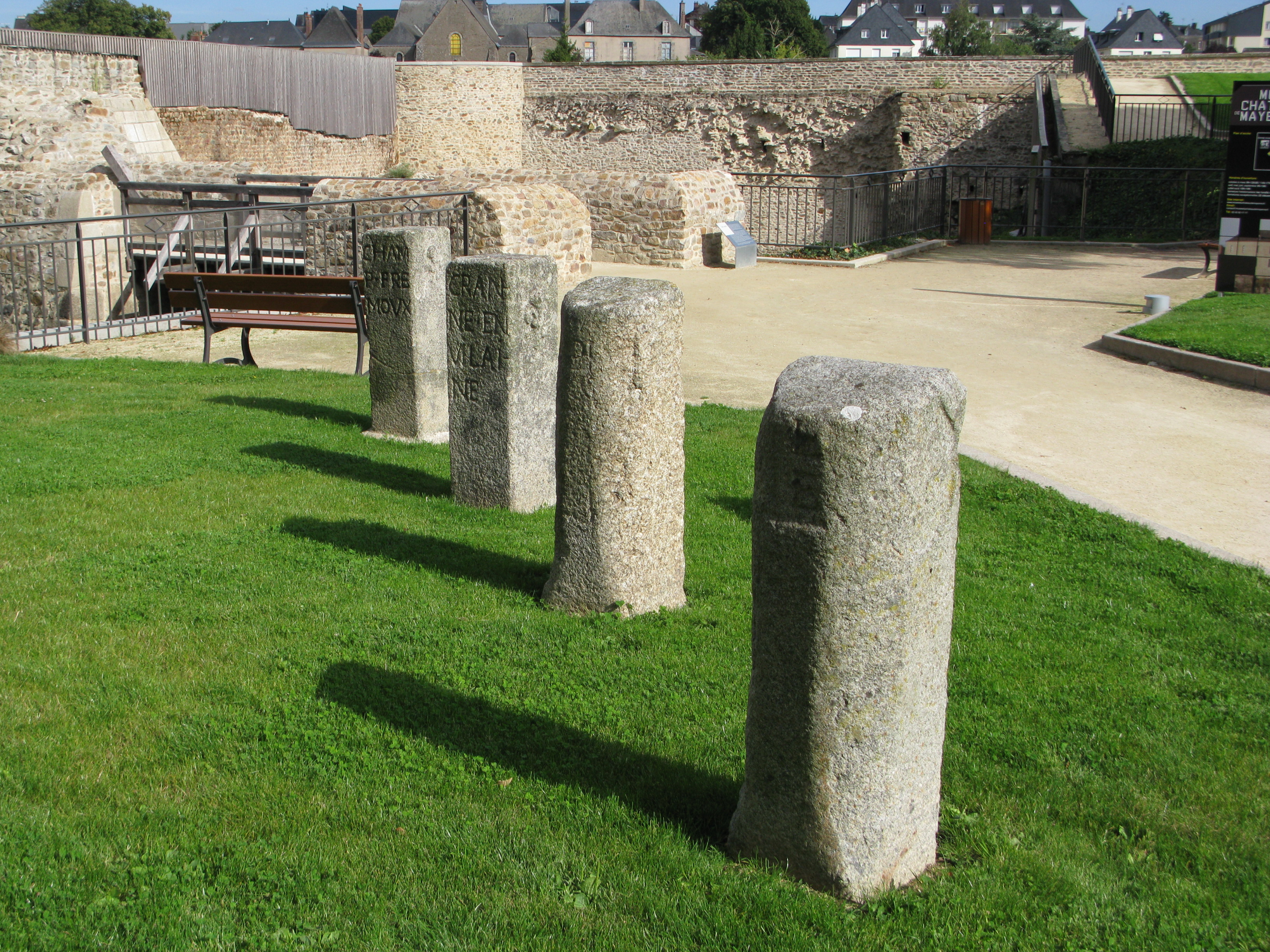 Bornes de corvée, utilisée pour délimiter les zones de corvées royales.